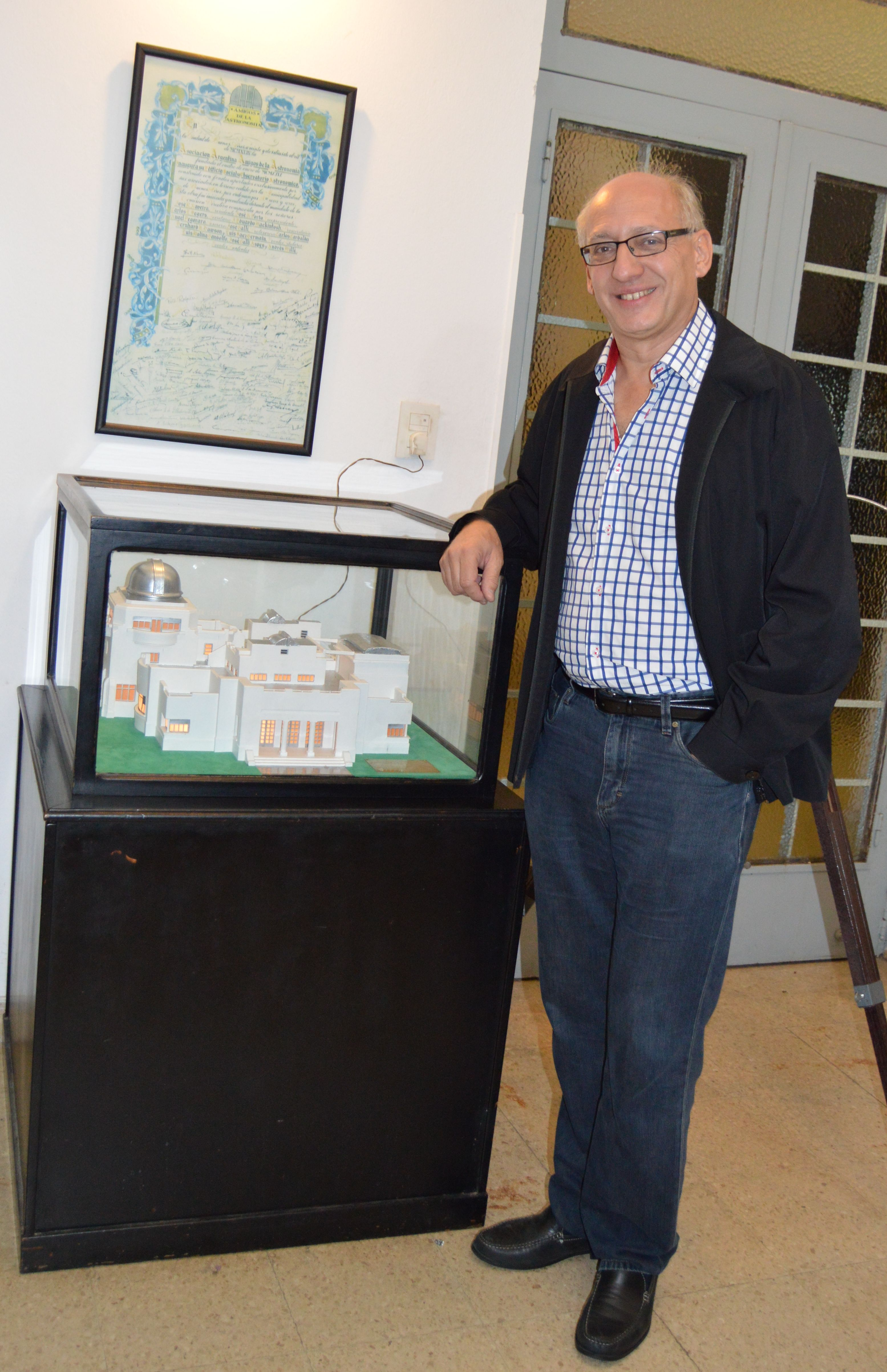 Miguel San Martín en octubre de 2016 en la Asociación Argentina Amigos de la Astronomía luego de brindar una charla en el lugar.